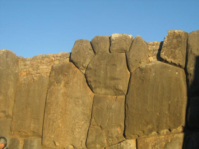 Una garra de puma hecha de piedras en Sacsayhuamán.